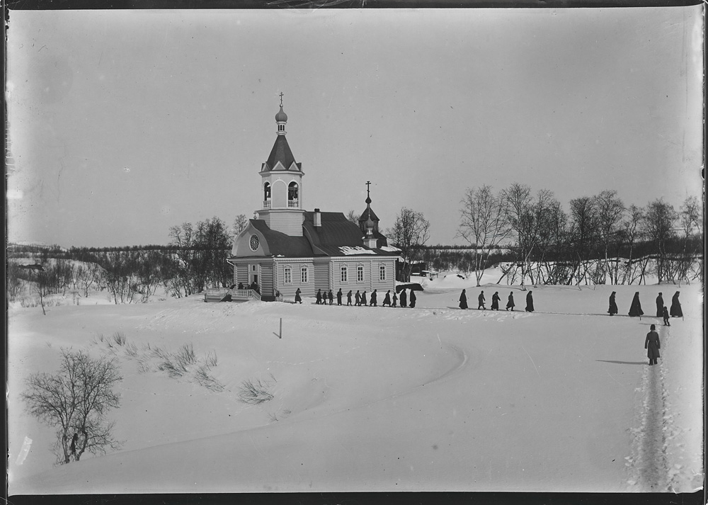 Wessel, Ellisif Rannveig Pechenga klosterkirke i vinterlandskap. Prester på vei hjem. Antatt datering:1911. (se Johansen, Austrem og Røde. 2007) NMFF.002135